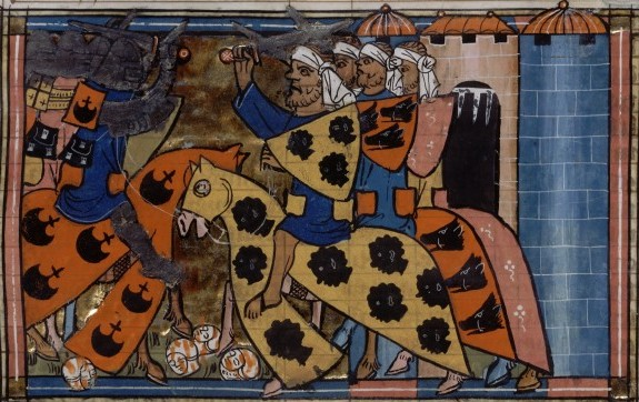 Bataille de Kibotos (1096)